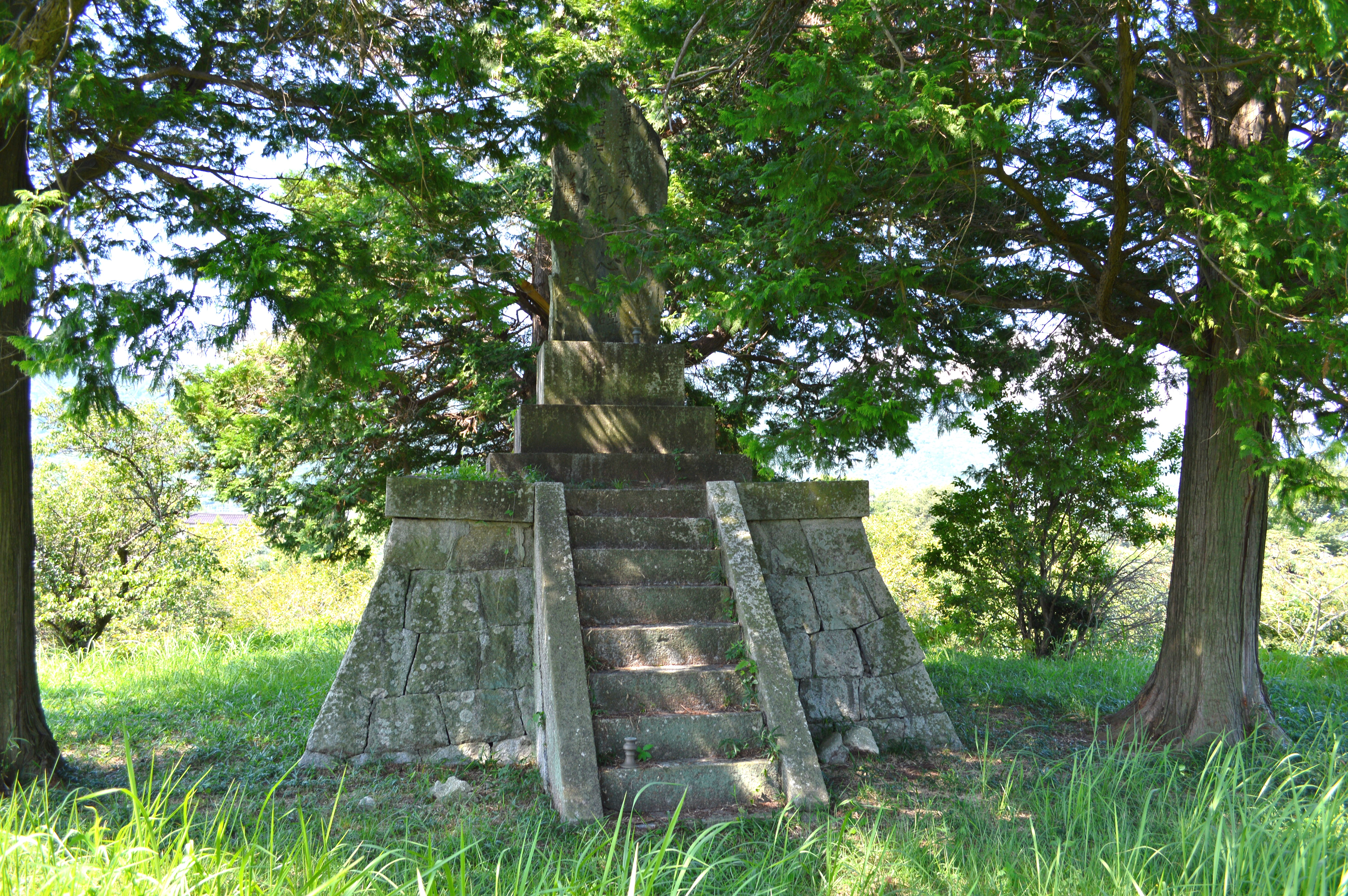 銚子塚古墳 (佐賀市) 墳頂の忠魂碑